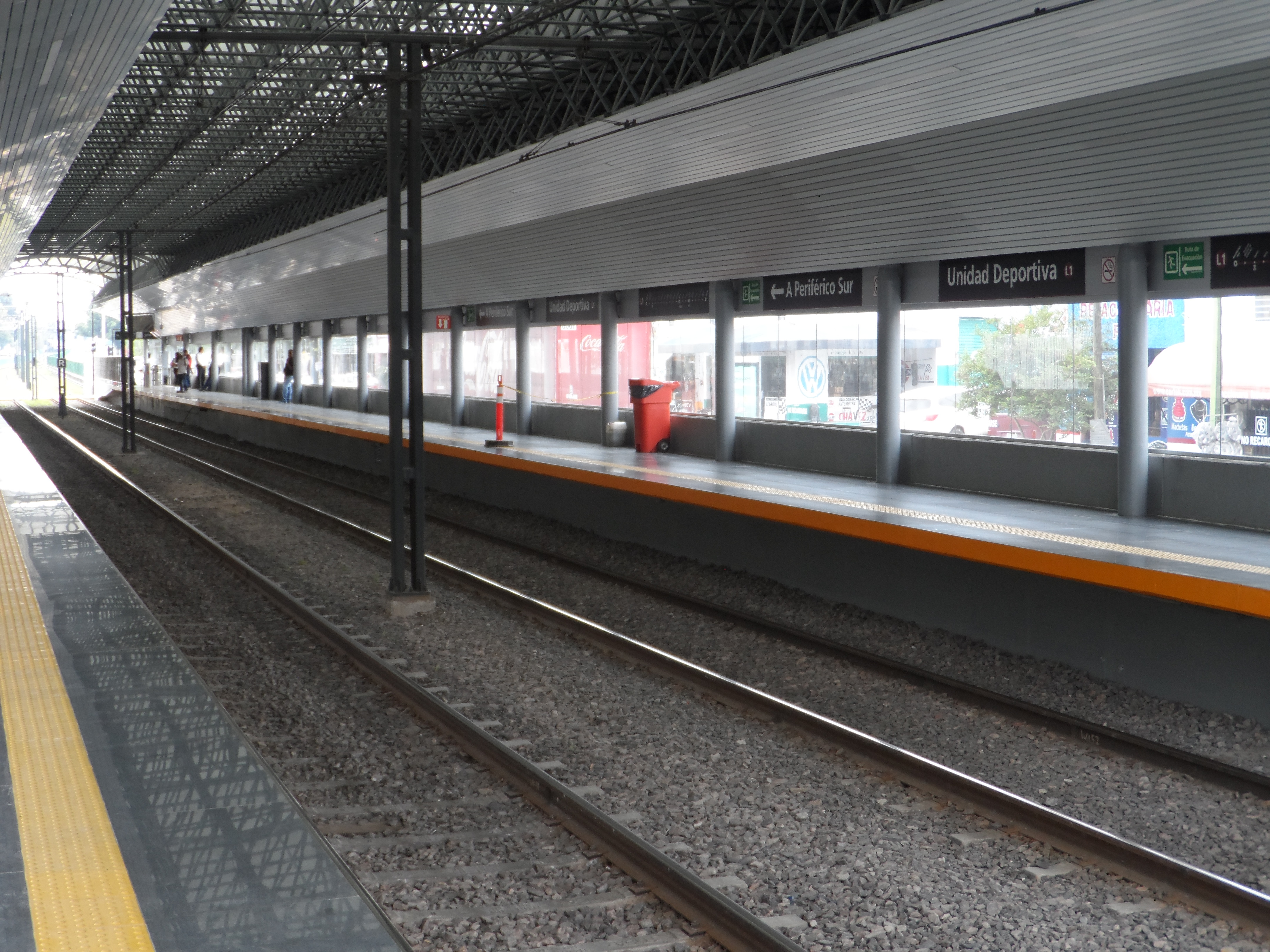 Andenes de la estación "Unidad Deportiva" de la Línea 1 del Tren Ligero de Guadalajara.